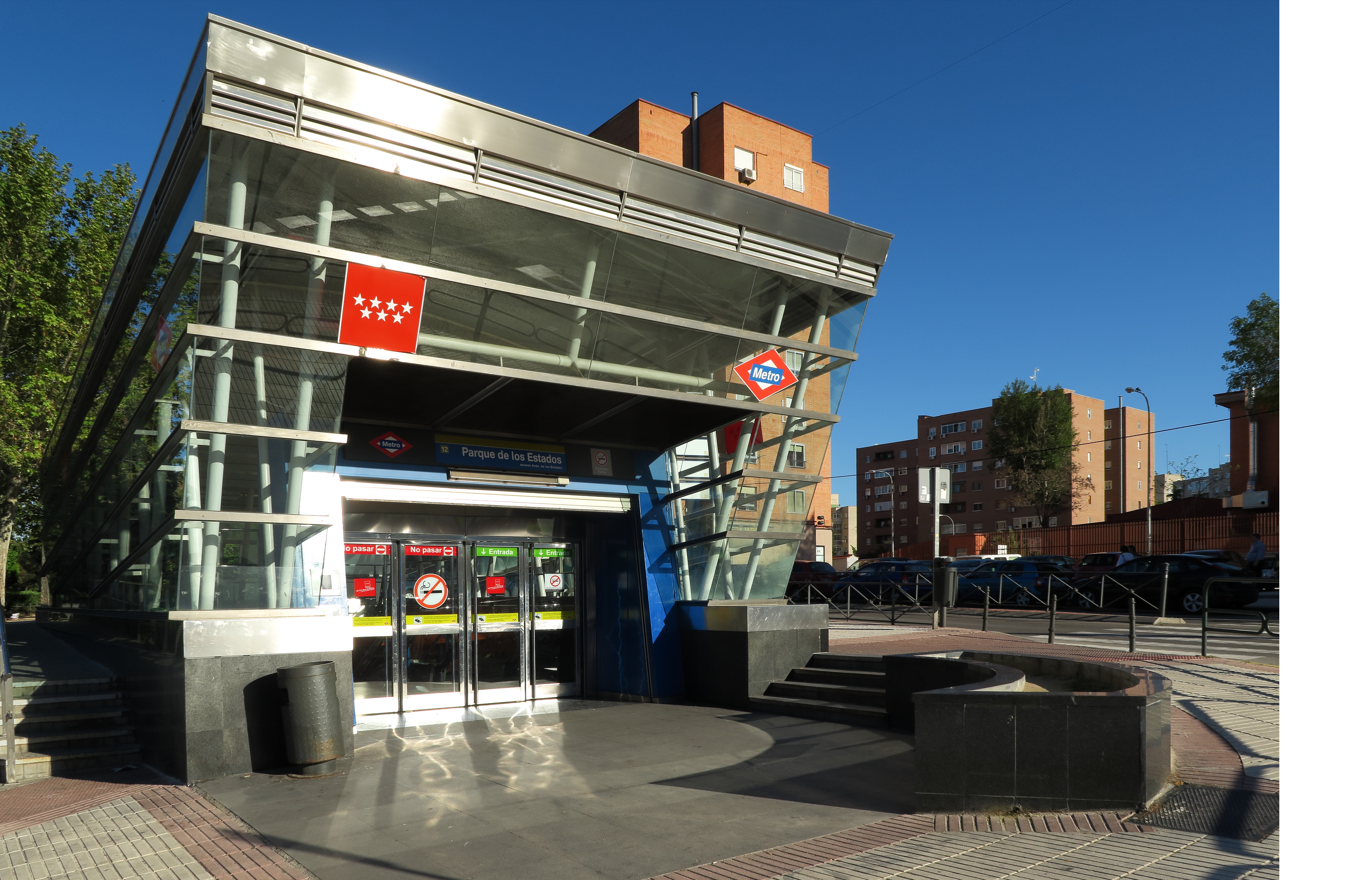 Estación de Parque de los Estados, acceso Avenida de los Estados